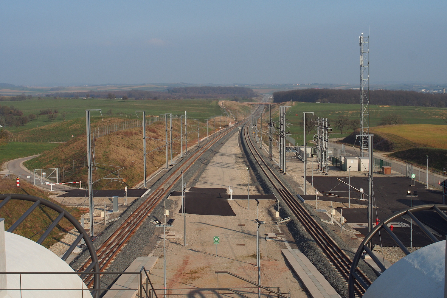 Vue depuis la sortie ouest du tunnel de Saverne, France.